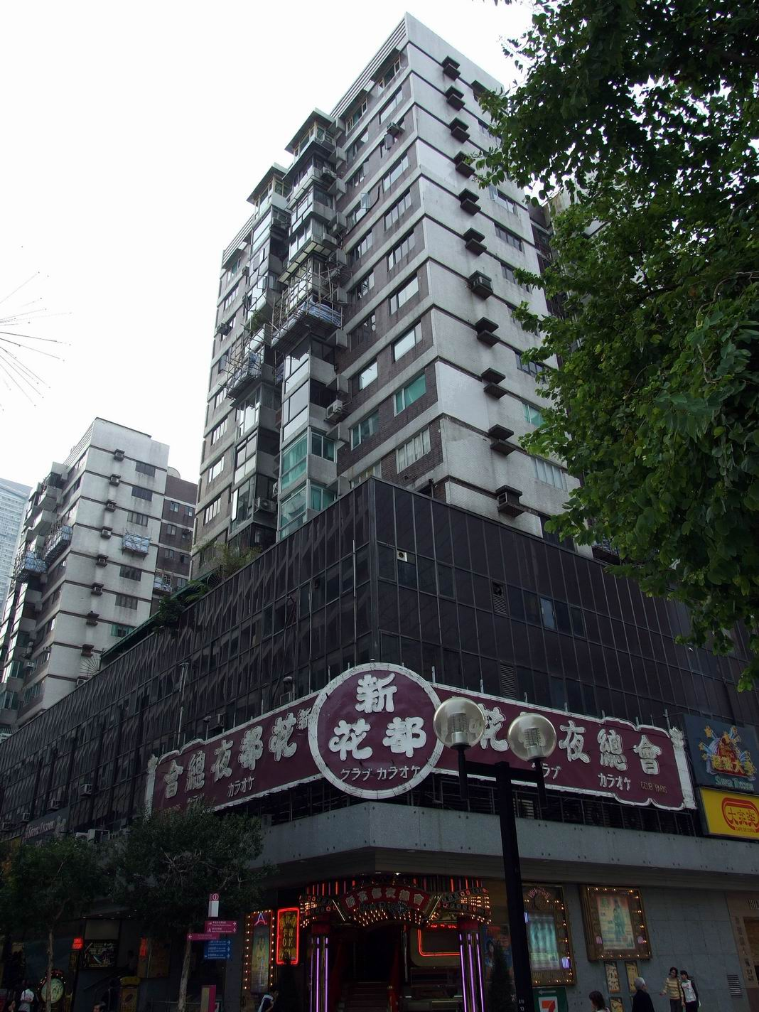 希爾頓大廈